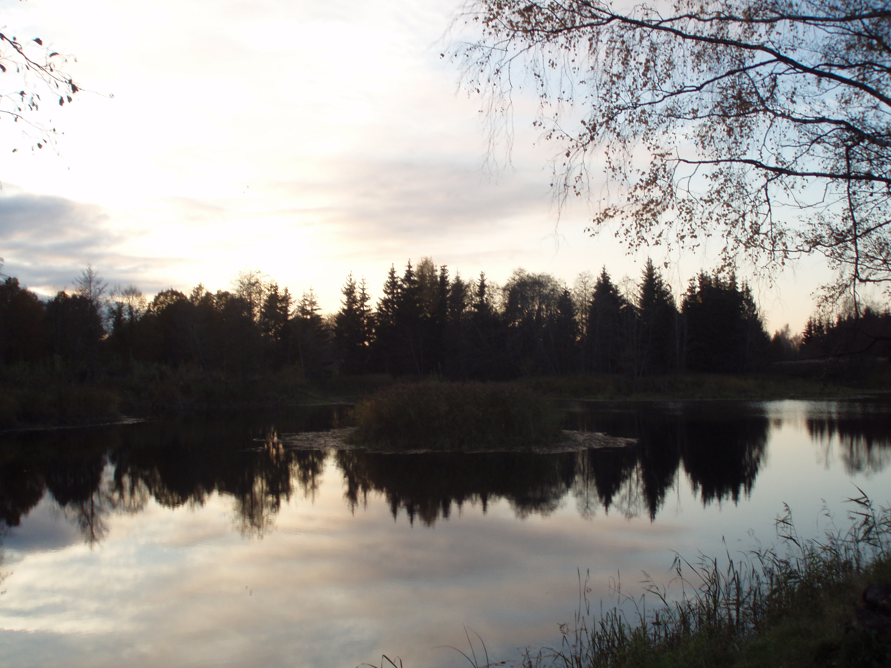 Karstiniai ežerėliai netoli Kirkilų kaimo Kirkilų geologinis draustinis